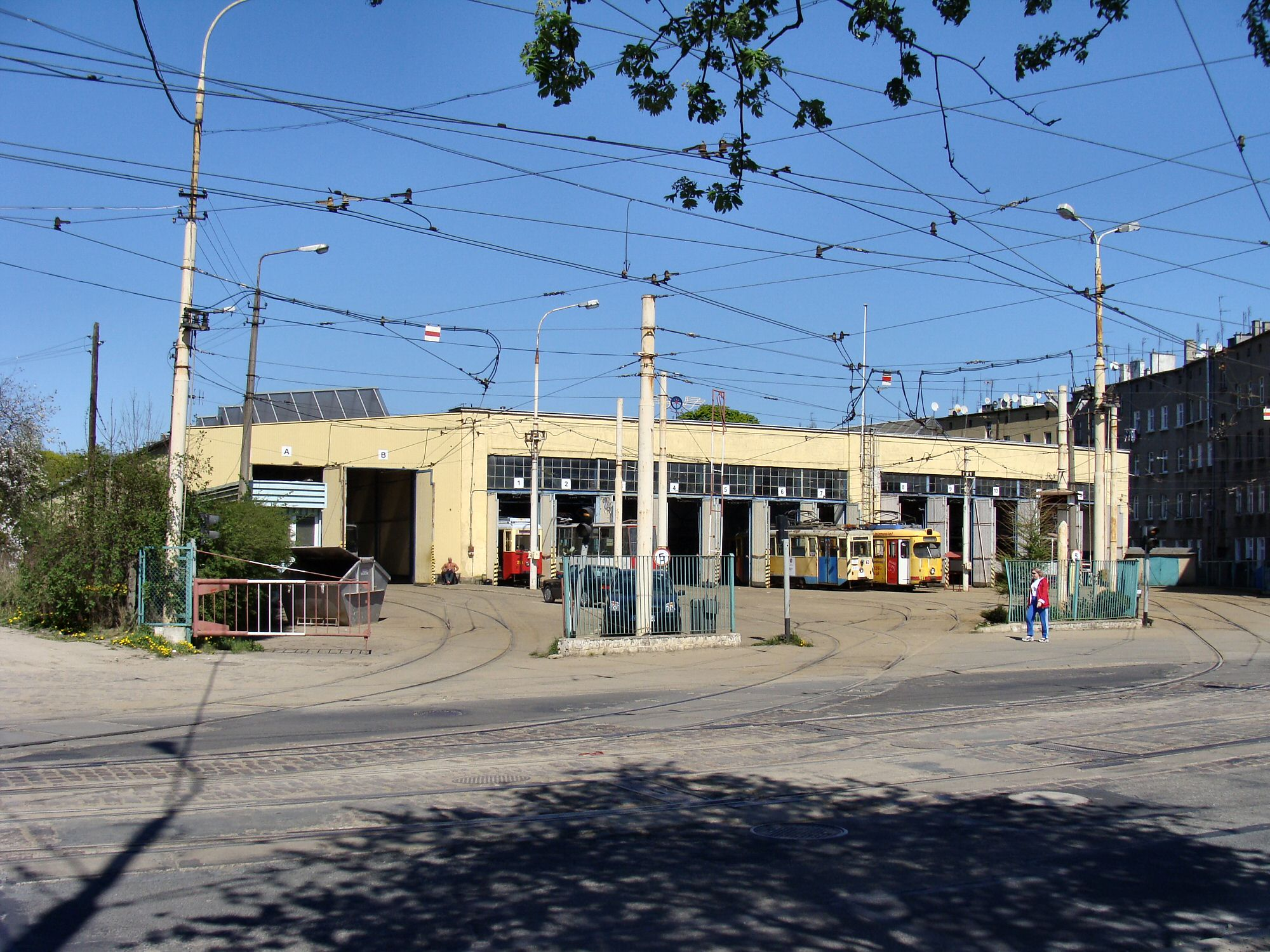 Zajezdnia Golęcin w Szczecinie